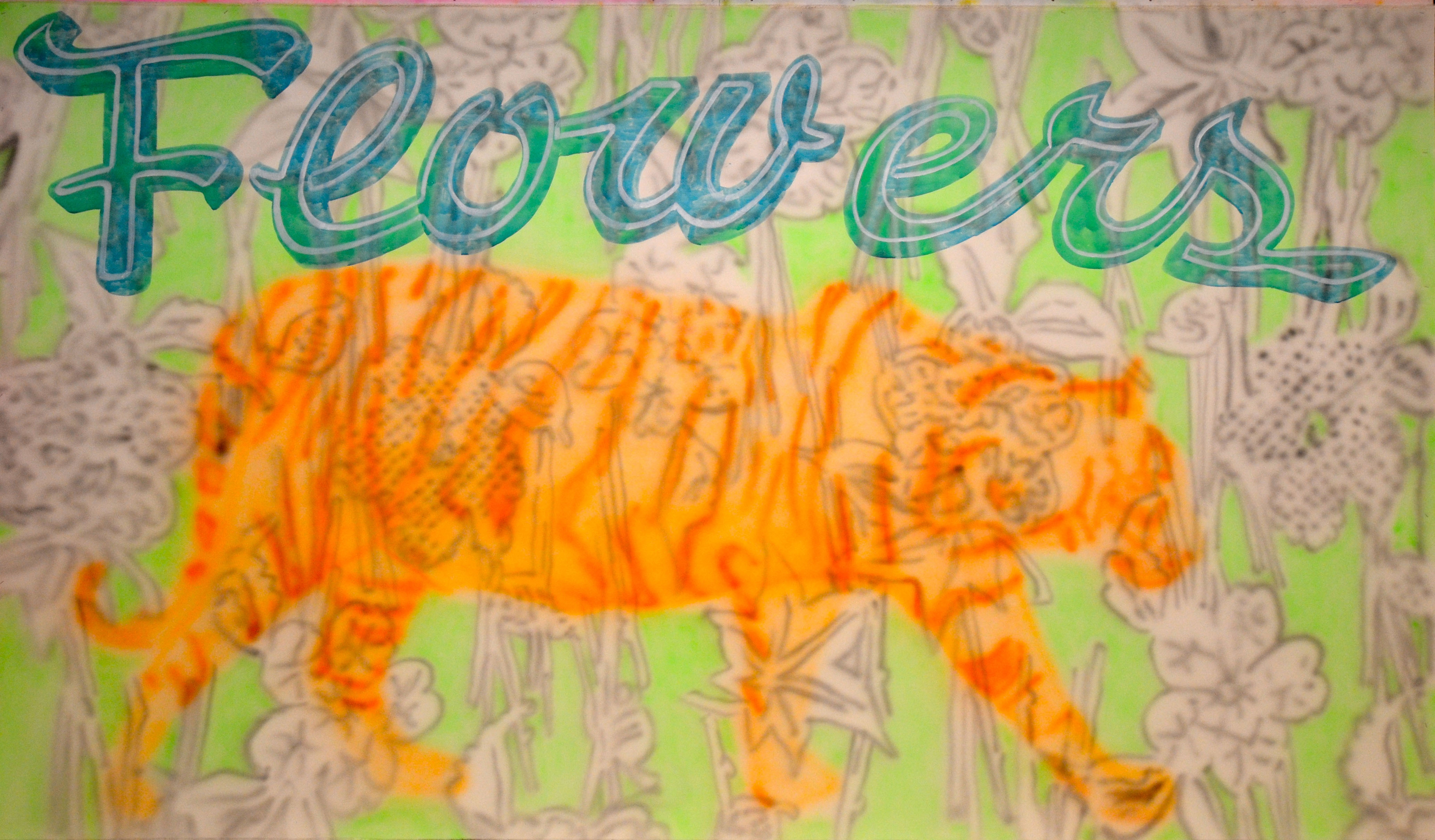 Keining - Flowertiger, 210 x 370 cm, Kunstharz auf Leinwand, 2011, Copyright Wolfgang Rieger und Horst Keining, 2013.